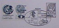 Sonderstempel zur Schacholympiade 1994 in Moskau